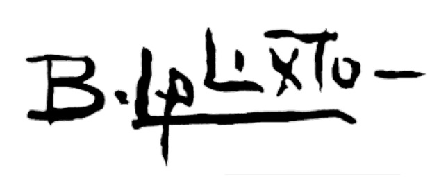 Assinatura do pintor Benedito Calixto.